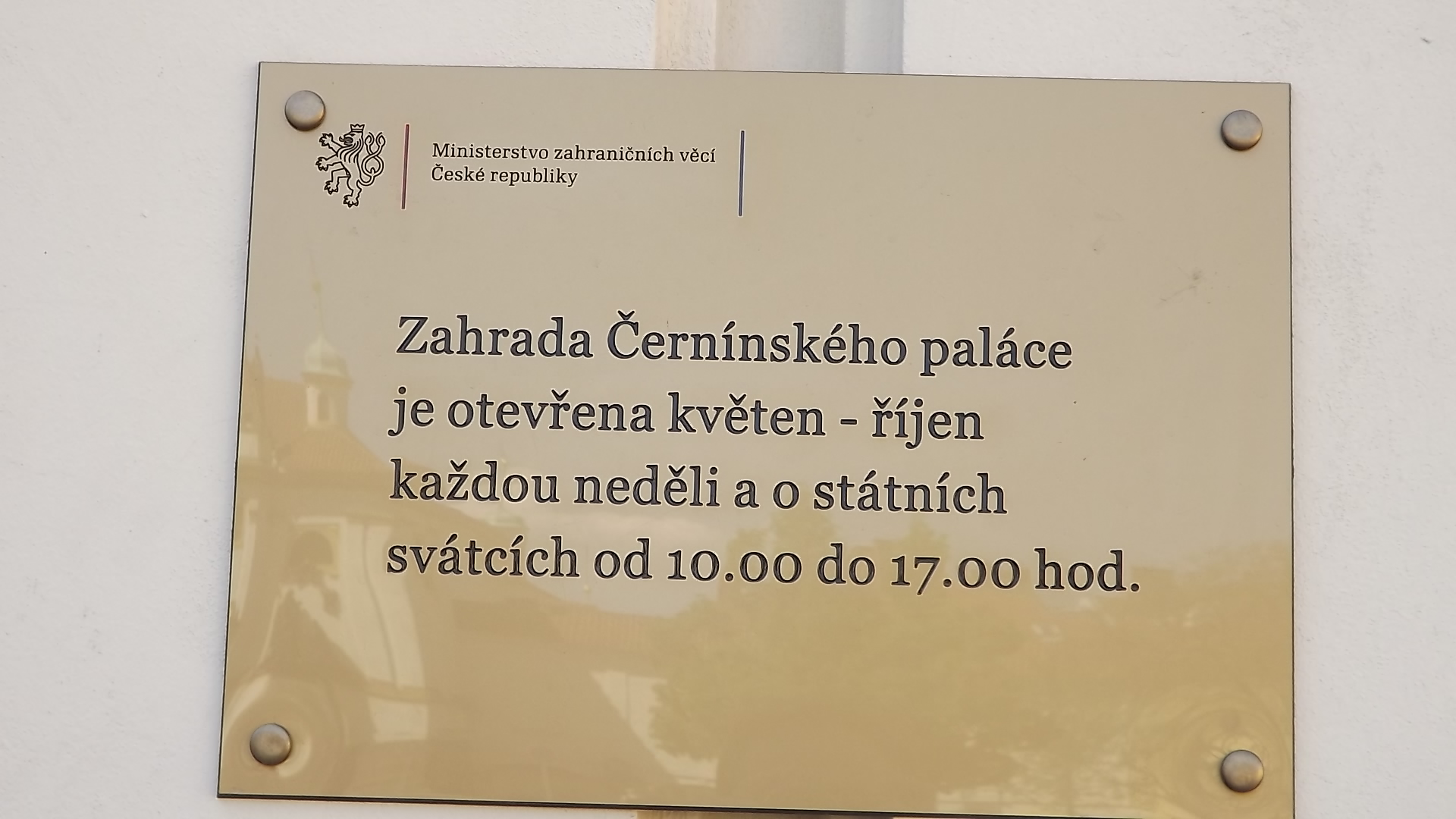 Černínská zahrada,1.května 2012